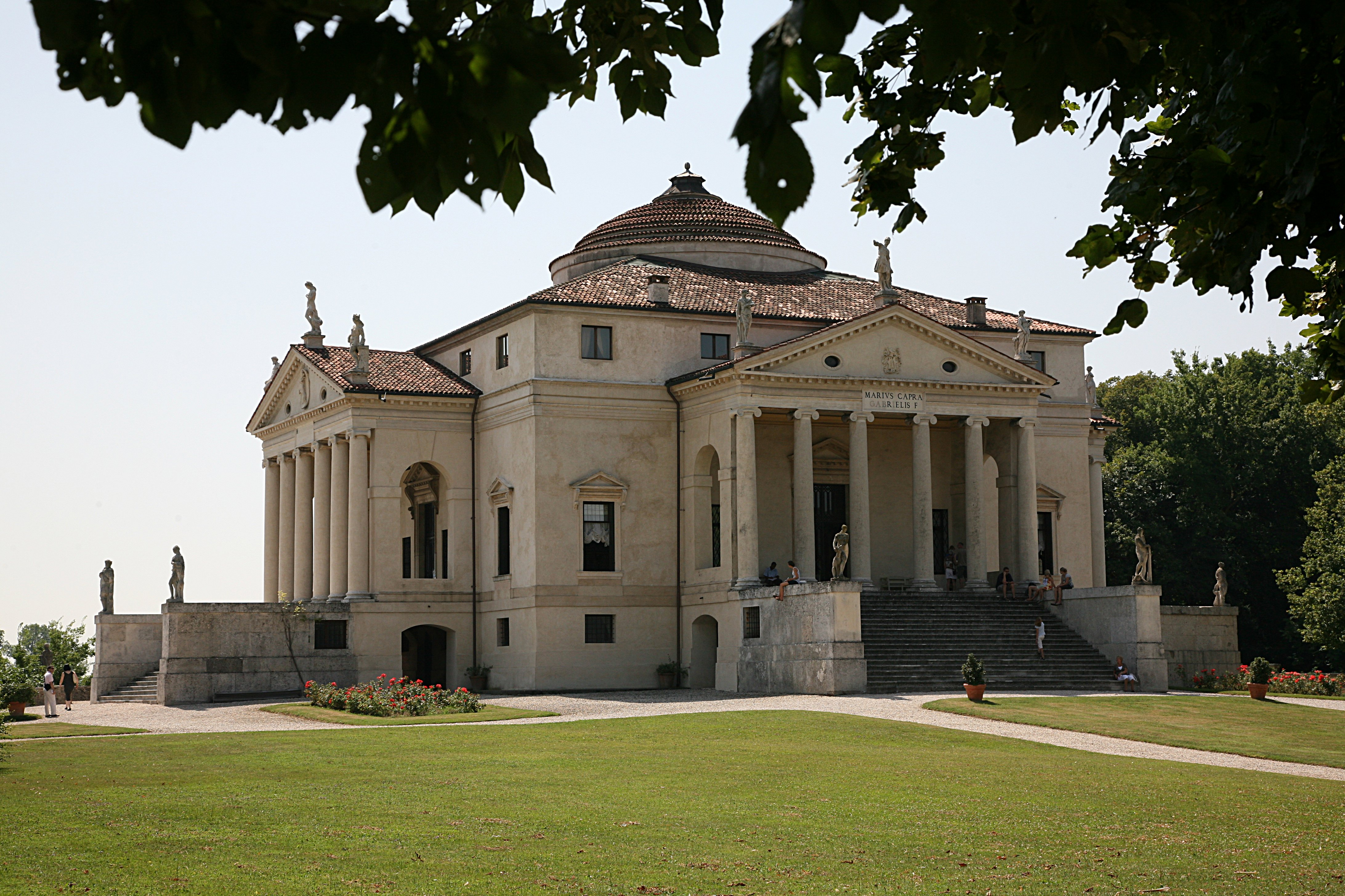 La Rotunda by Andrea Palladio